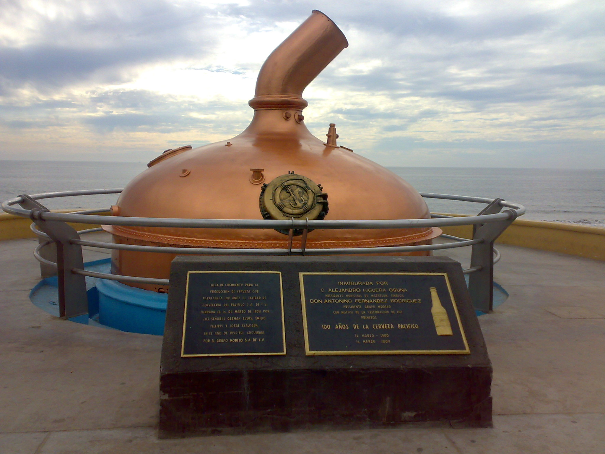 Cervecería Pacífico, Mazatlán.